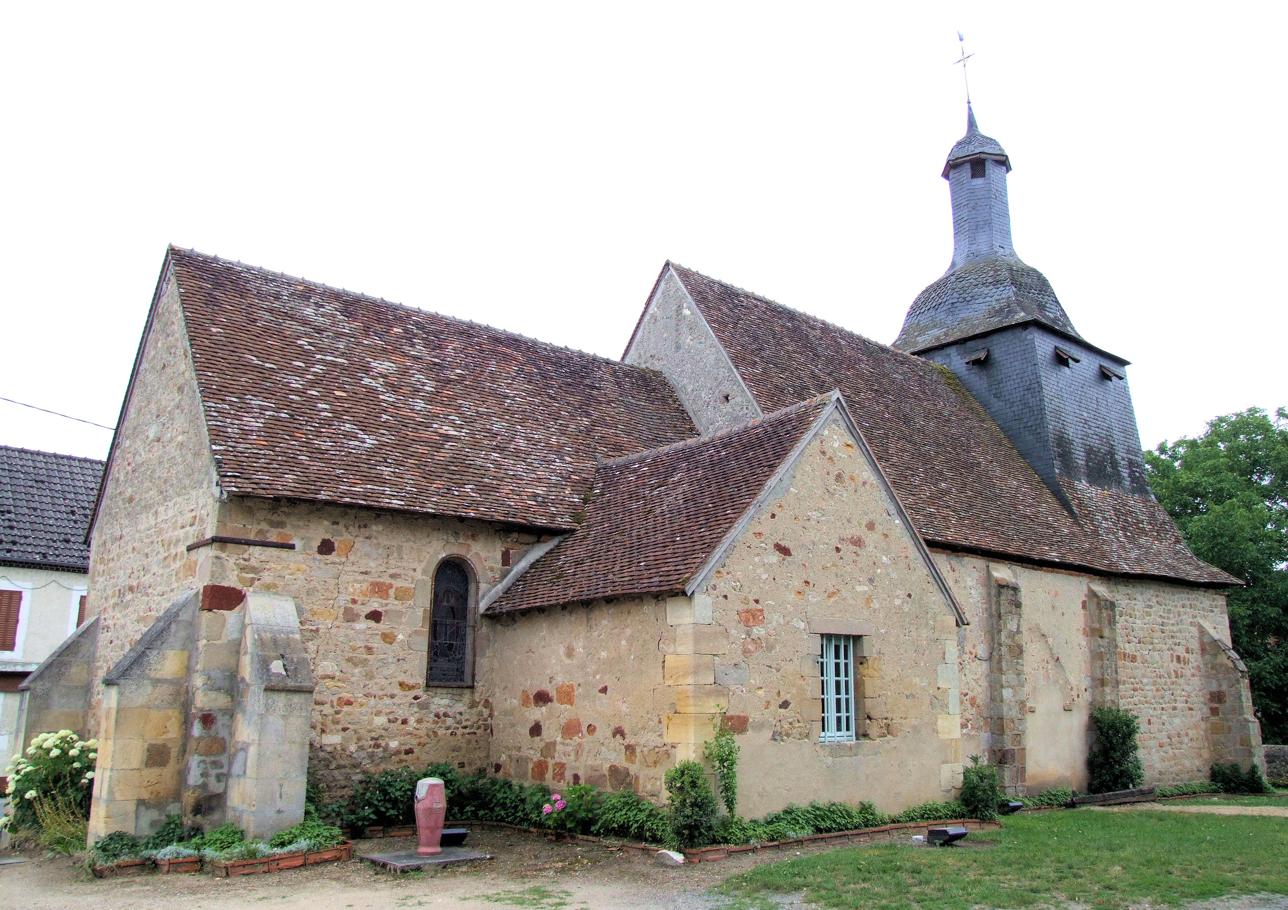 Épineuil-le-Fleuriel - Eglise Saint-Martin